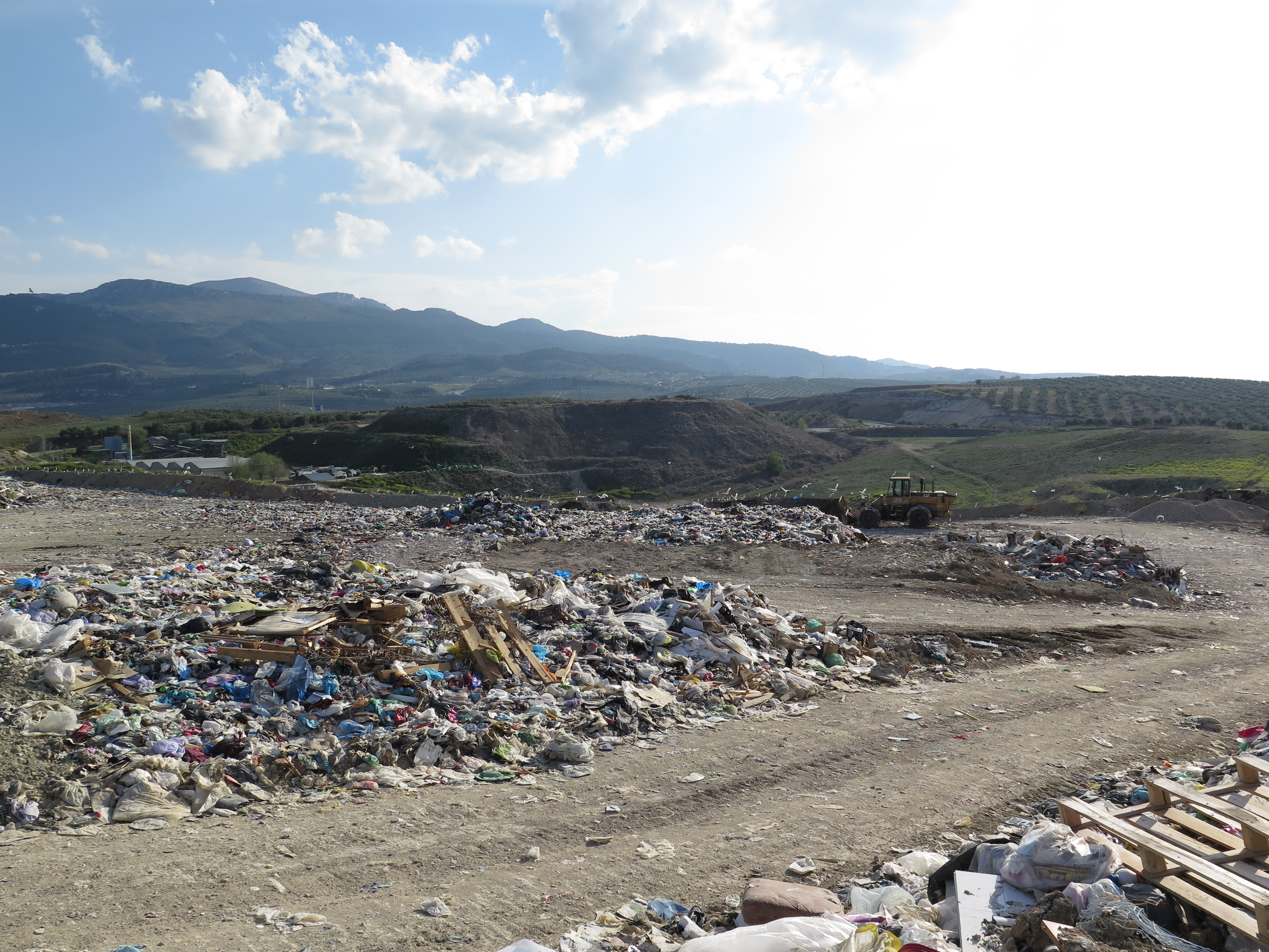 Vista del vertedero municipal de Jaén.